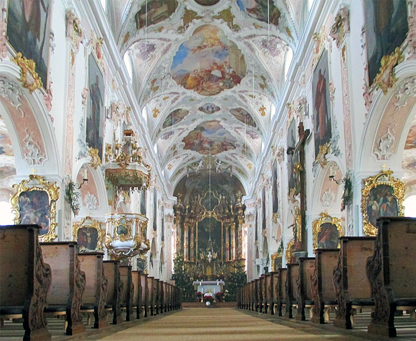 Martinsmünster, Fischbachau